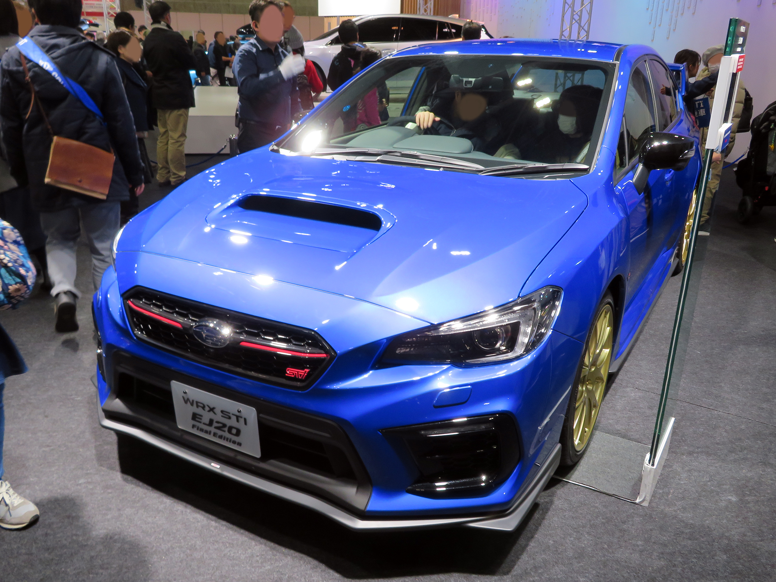 大阪モーターショー2019に於いてCBA-VAB型スバル・WRX STI EJ20 Final Editionを撮影。